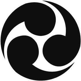 左三つ巴 家紋